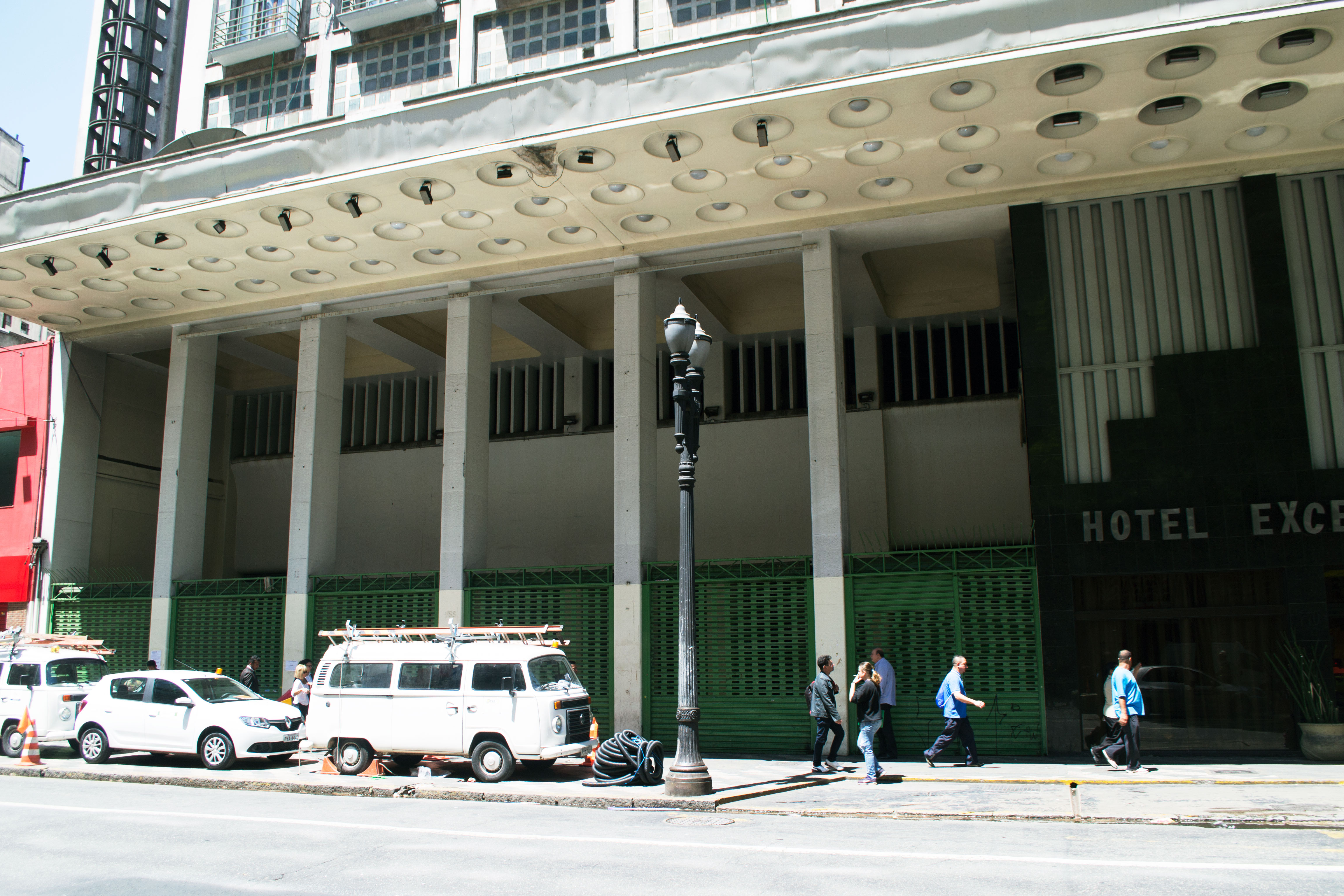 Fachada do Hotel Excelsior Ipiranga vista de lado, São Paulo (SP), Brasil